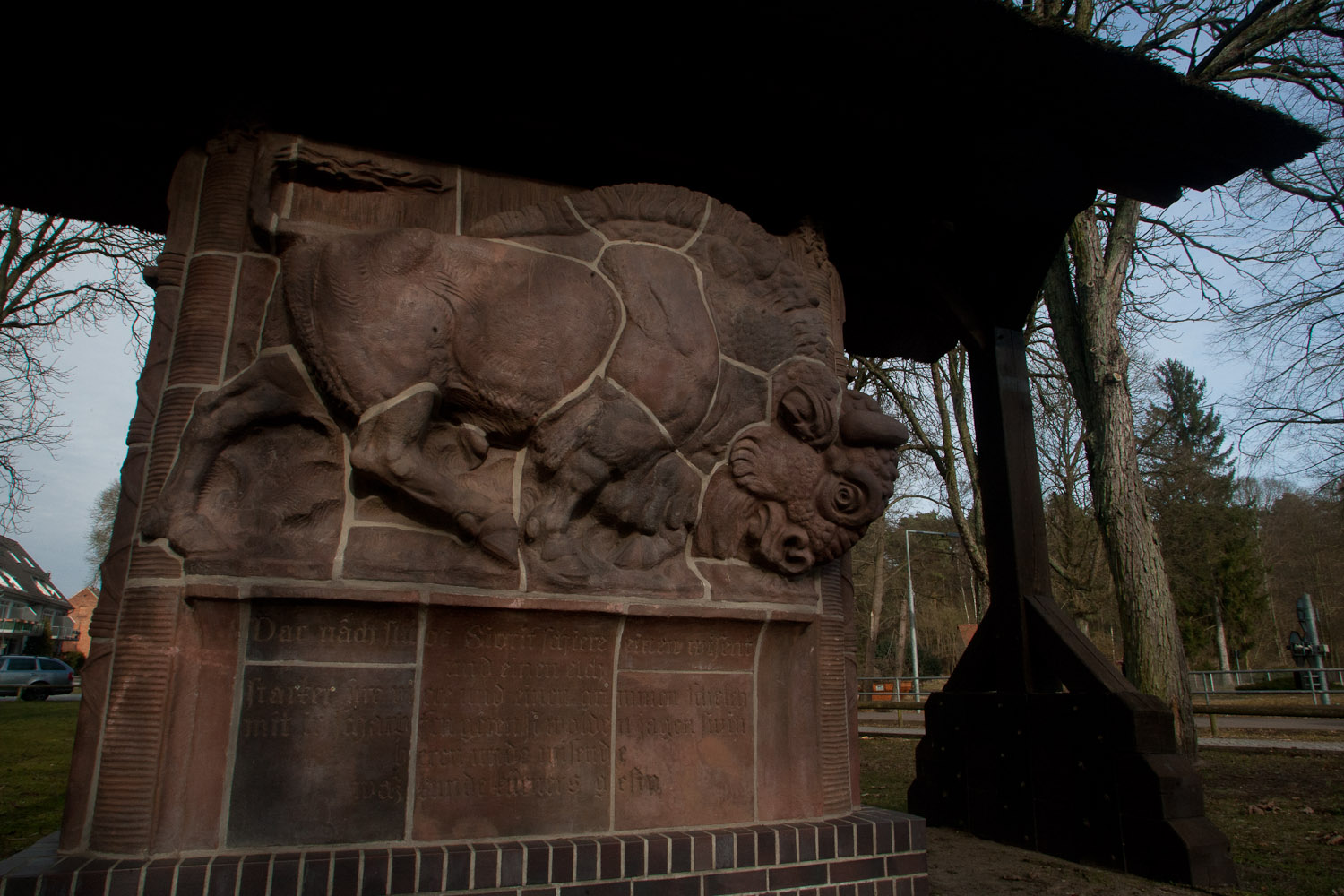 Wisentdenkmal (von 1934)